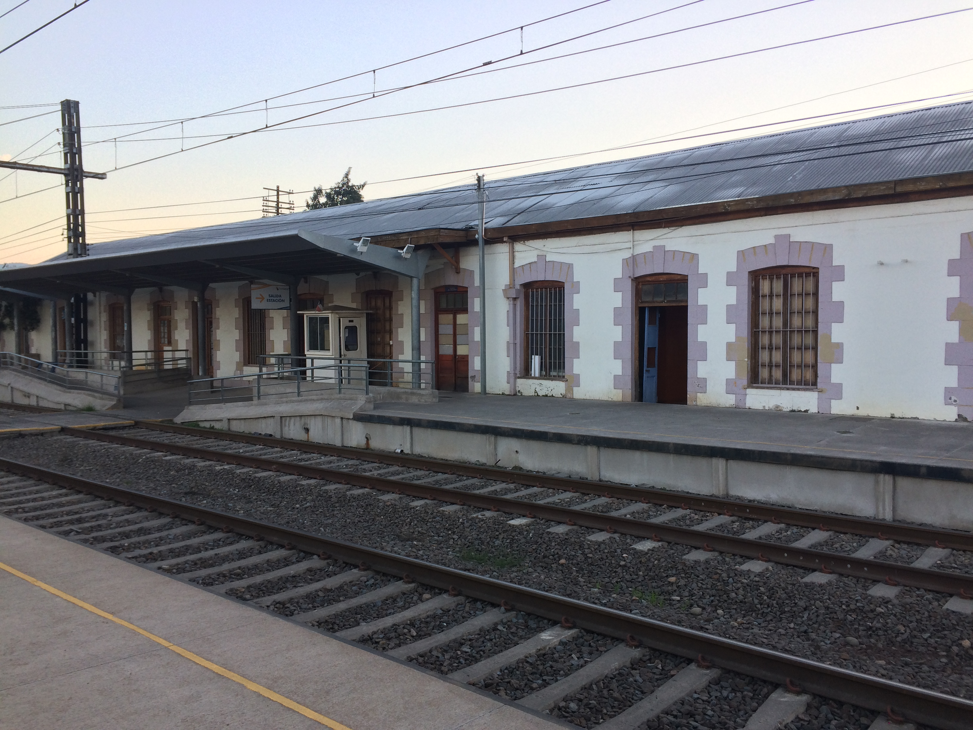 Estación de Ferrocarriles de San Fernando, fotografía tomada el 26 de mayo de 2017.